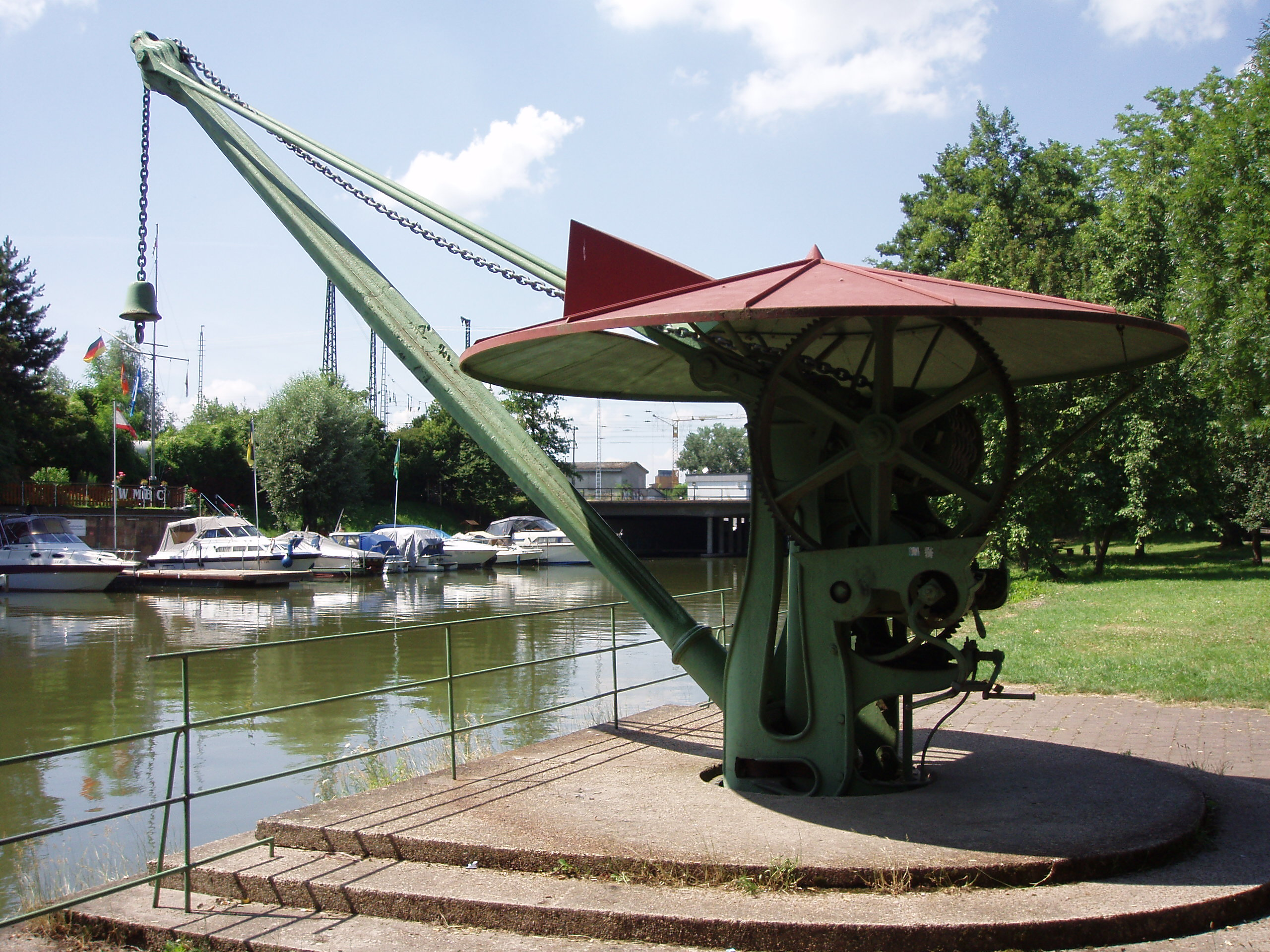 Handbetriebener Kran aus dem 19. Jahrhundert, Heilbronn